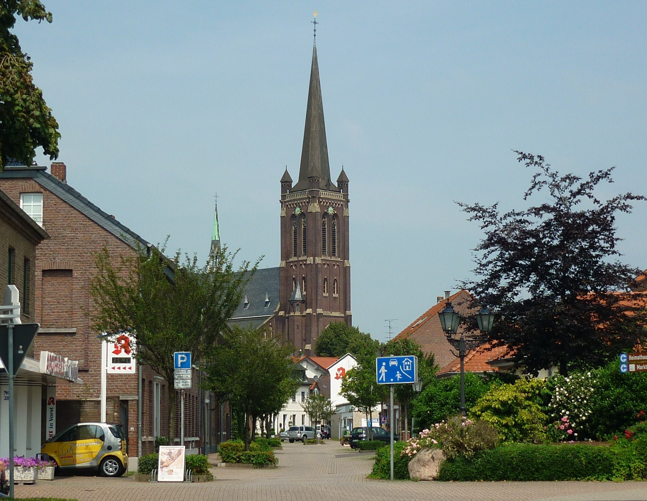 Tönisvorst-Vorst, Kuhstraße